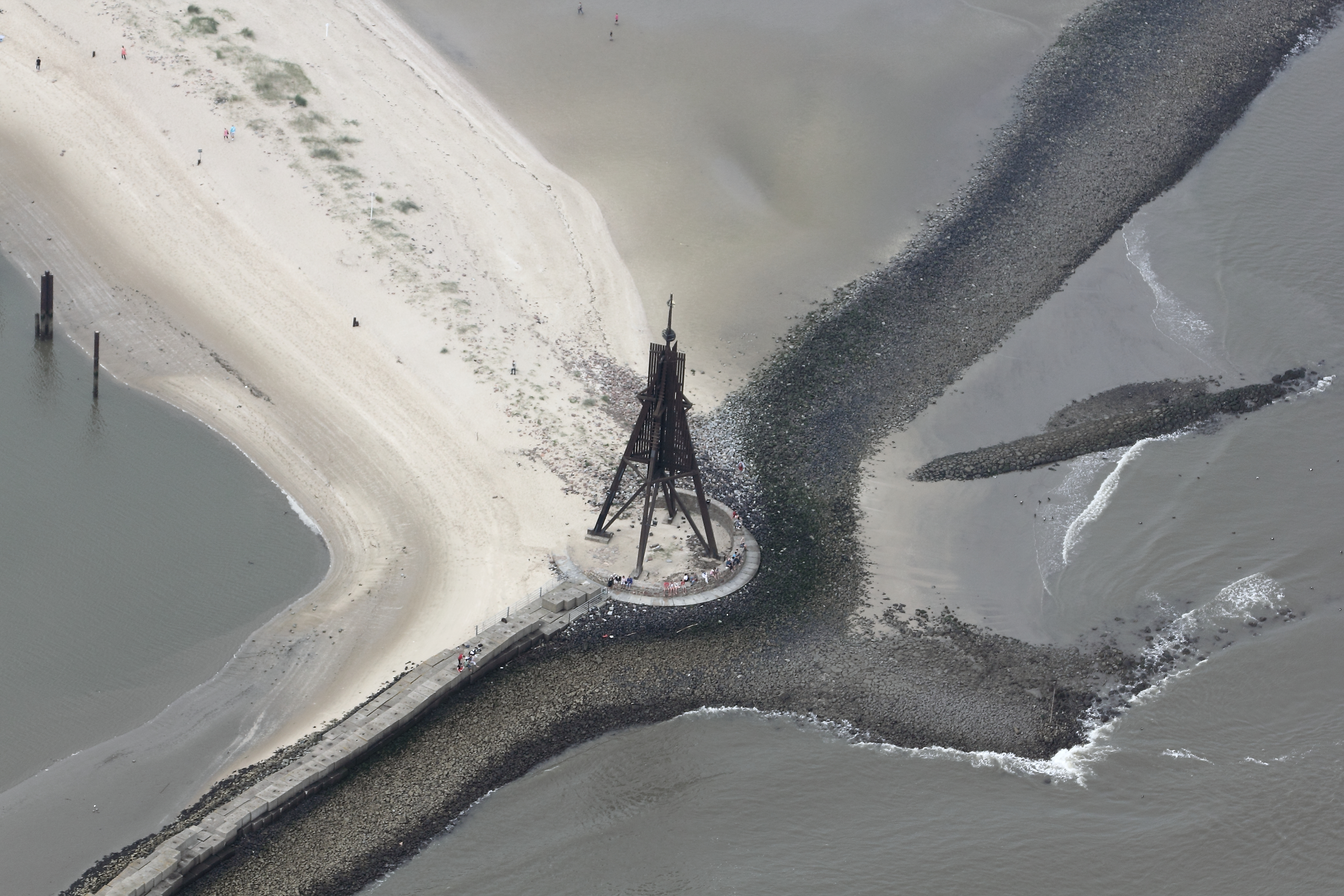 Die Kugelbake aus der Luft gesehen (nach links oben geht es auf dem Sandweg zum Döser Deich, links unten ist das Wasser der Elbe) Dieses Foto entstand aufgrund eines Projektes, das von Wikimedia Deutschland e. V. gefördert wurde. Im Rahmen des „Community-Projektbudgets“ sollen Luftbilder u.a. von Inseln, Halligen, Sanden und Küstenstädten der deutschen Nordseeküste angefertigt werden. Das Projekt „Fotoflüge“ wurde im September 2011 begonnen.